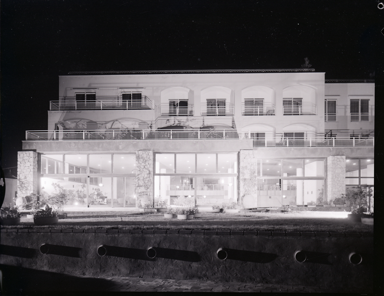 Capri. Anacapri. Architetti Bettonica e Frattini, Hotel Europa Palace (oggi Capri Palace?) e boutique annessa Mariorita. Vedute. Servizio fotografico : Capri, 1963 / Paolo Monti. - Buste: 3, Fototipi: 3 : Negativo b/n, gelatina bromuro d'argento/ pellicola ; 10x12. - ((Serie costituita da 3 buste sciolte di negativi identificati con una doppia numerazione (da 41605 a 41635): 23827, 23832, 23857. - La doppia numerazione potrebbe corrispondere ai lavori realizzati durante il periodo di attività del laboratorio e studio fotografico "Foto Studio 22", società che risulta essere stata aperta il 10/04/1961, con partecipazione, nel ruolo di gerente, di Vincenzo Carrese. - Fonte: Rubrica di Paolo Monti: Archivio fino 1-4-1961/ 31-3-1963 (1961-1963), presso Archivio Paolo Monti